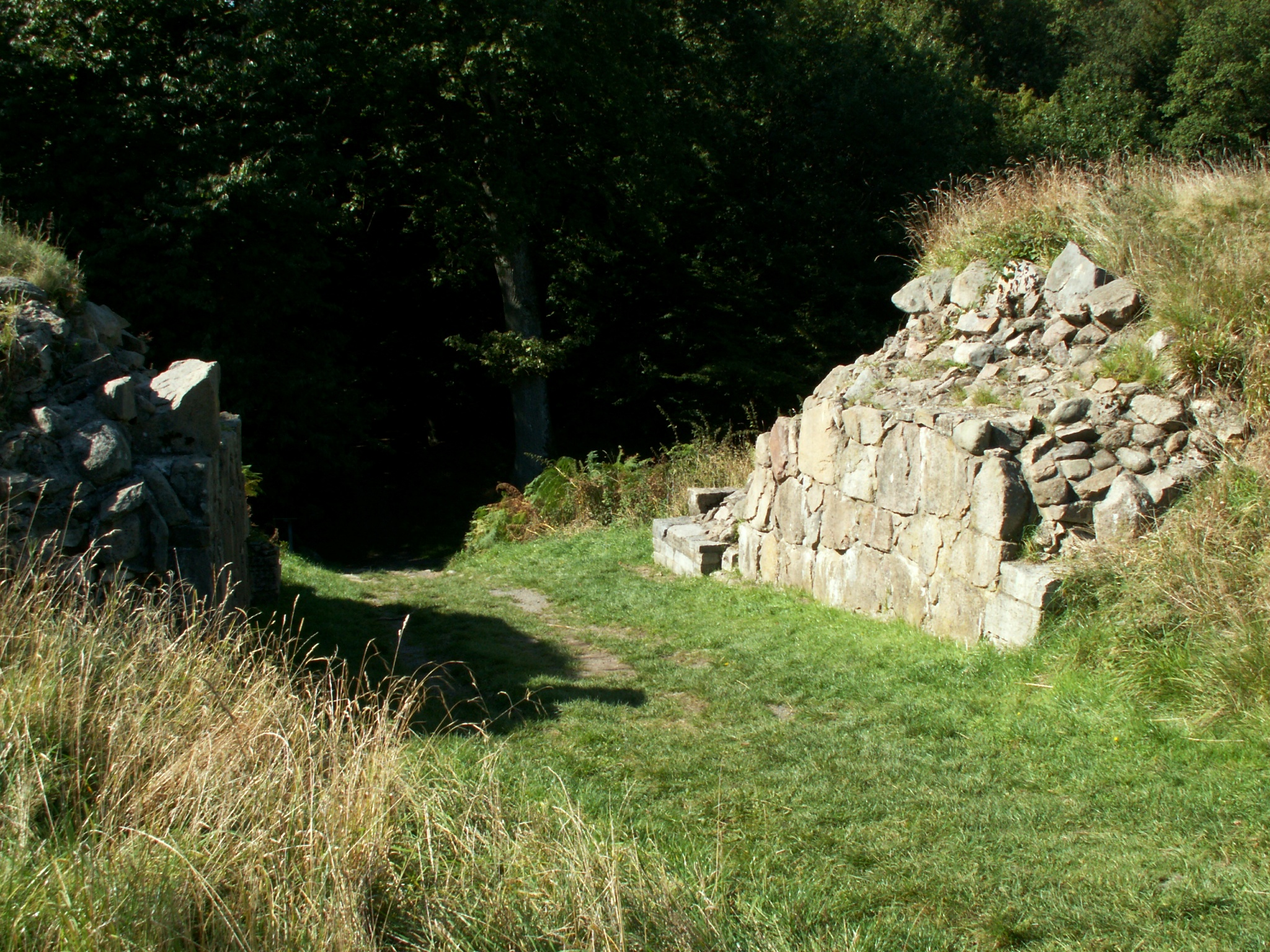 wyjście z Gamleborgu - dawnego grodziska